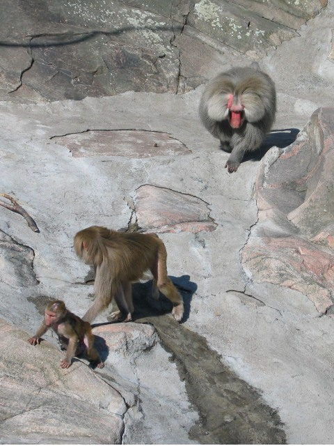 Korkeasaaren paviaanit